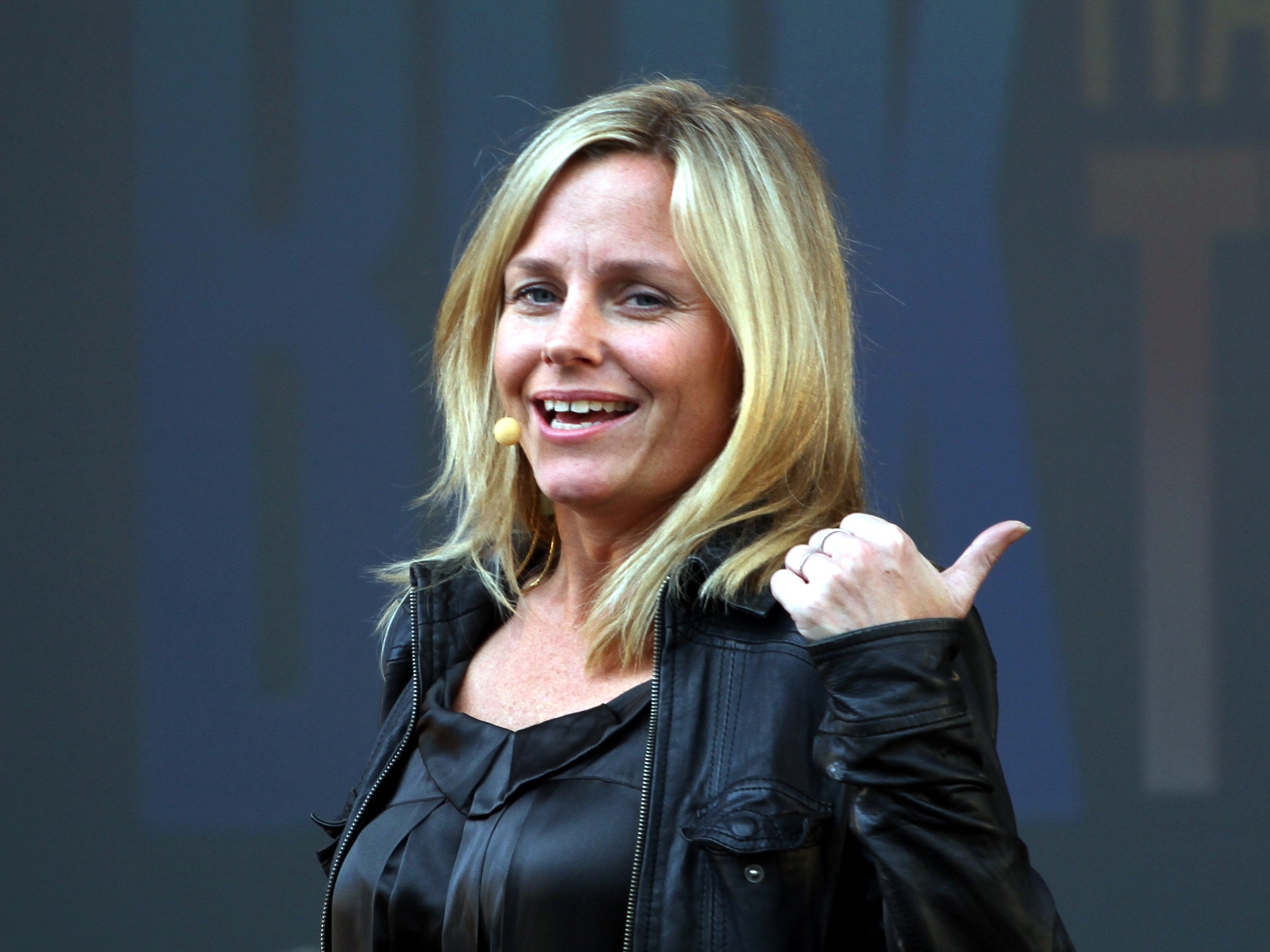 Solveig Kloppen under Oslo bokfestival 2010.